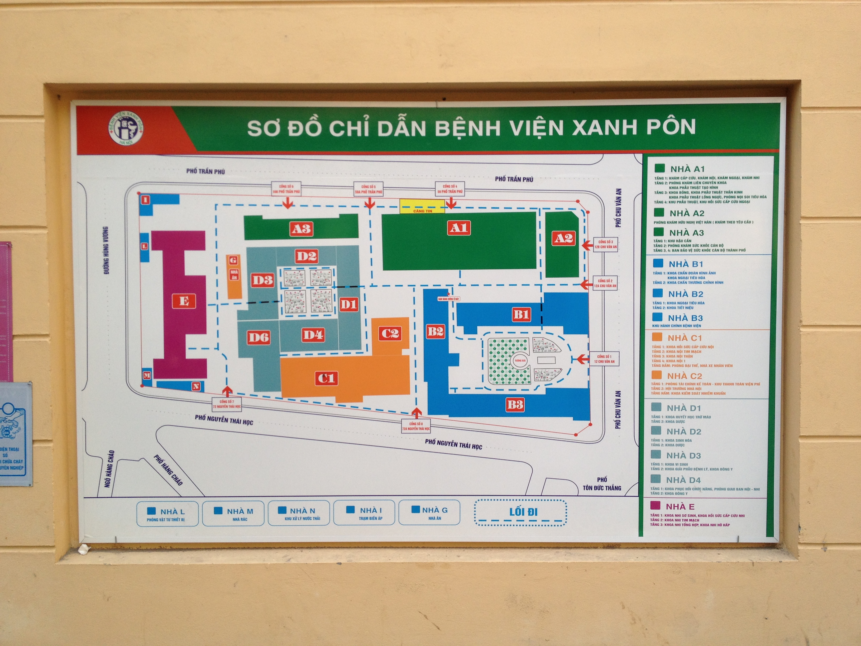 Bệnh viện Xanh Pôn, Hà Nội, Việt Nam.